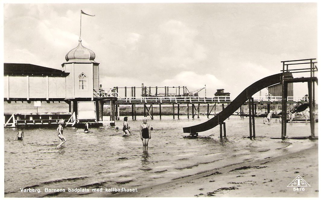 Barnens Badstrand